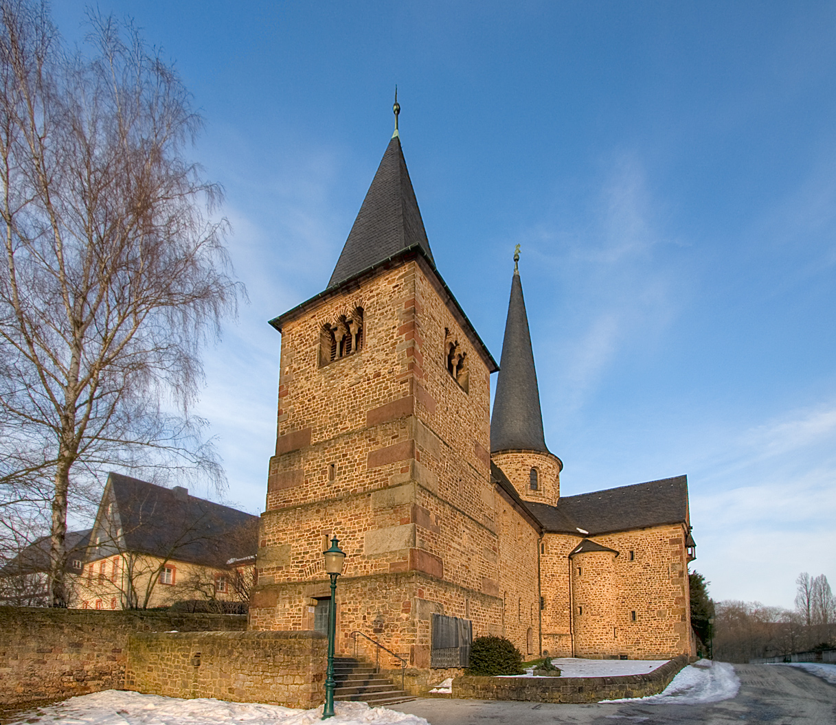 St. Michaelskirche - Der karolingische Rundbau (822), die Friedhofskapelle des Fuldaer Benediktinerkloster, von dem noch die Krypta erhalten ist, wurde im 10./11. Jahrhundert zu einer romanischen Kreuzanlage erweitert. Fulda